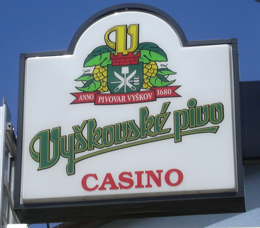 Vyškovské pivo logo(Beer- czech republic)